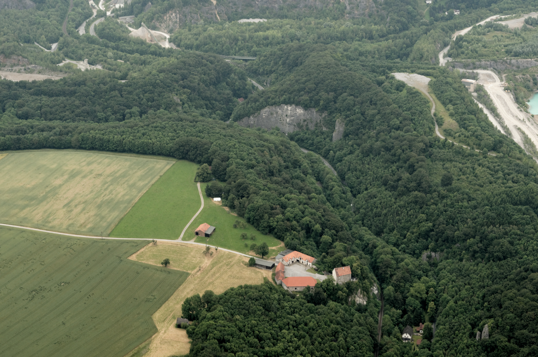 Fotoflug Sauerland Nord. Balve, Hönnetal mit Hönnetalbahn, Burg Klusenstein, Klusensteiner Mühle, Naturschutzgebiet Hönnetal, rechts Steinbruch Oberrödinghausen der Fa. Rheinkalk, Blickrichtung Nord The making of this document was supported by the Community-Budget of Wikimedia Germany.